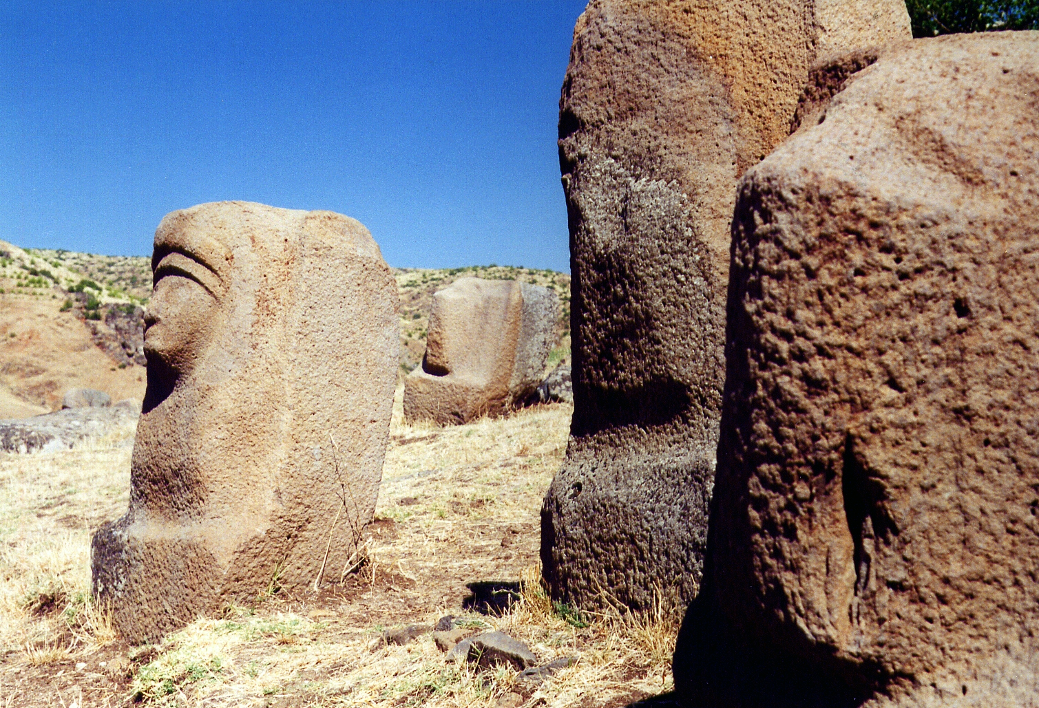 Yesemek, Hethitische Bildhauerwerkstatt, Südosttürkei, Sphingen